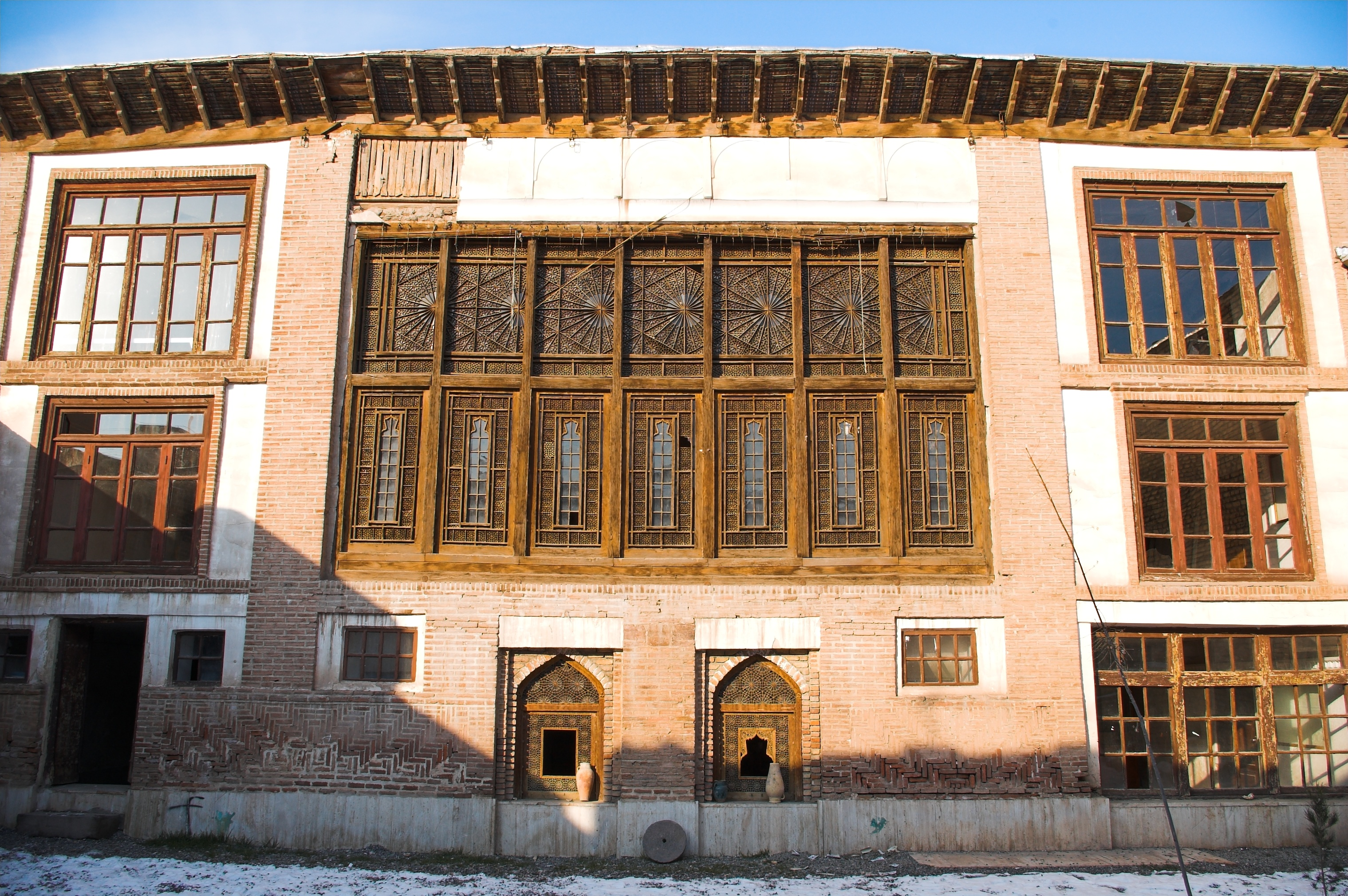 Facade and windows — Khaneh Kabiri, in Khoy. Qajar era